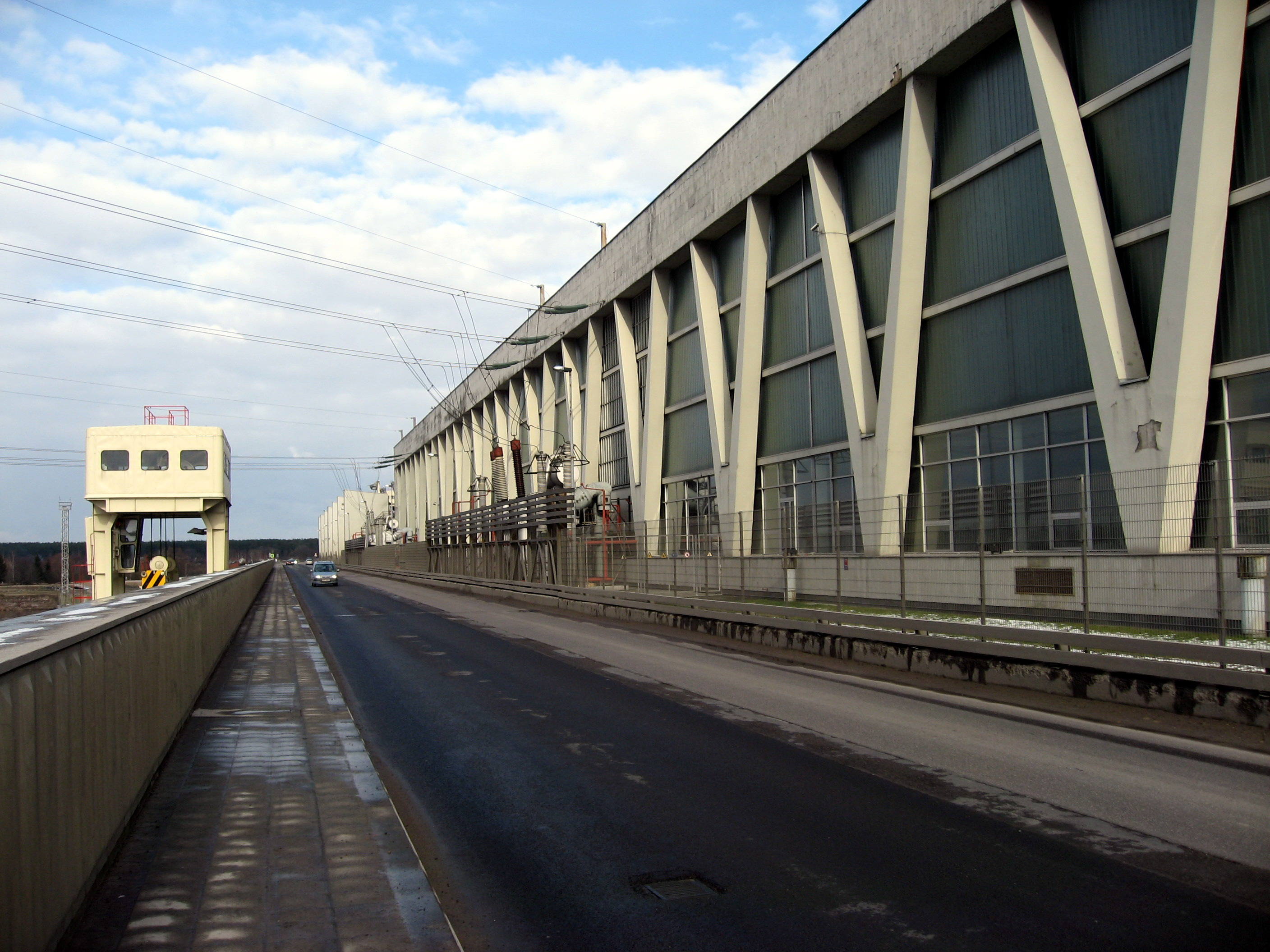 Rīgas HES